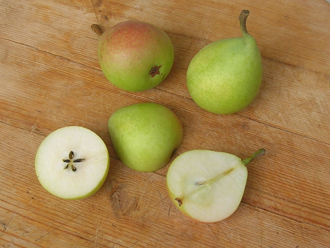 La pera Ercolina è una varietà di pera di origine italiana, prodotta soprattutto in Francia e Spagna. Pera di Jumilla (DOP) è una pera Ercolina.